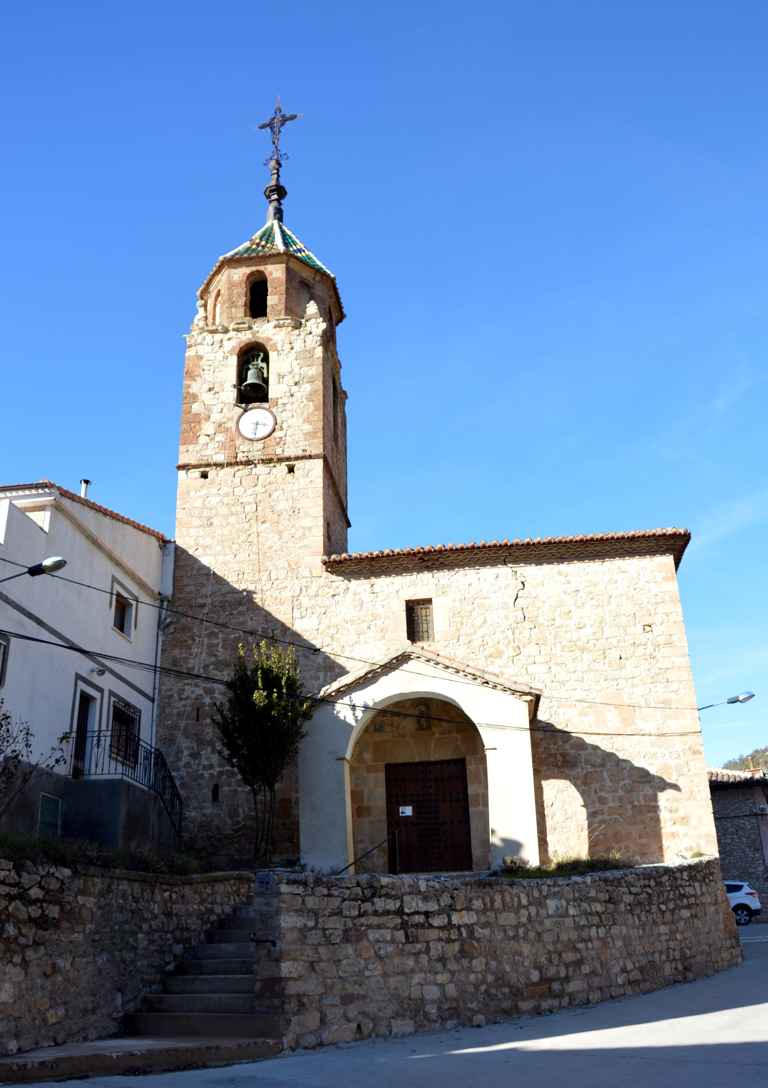 Vista frontal (meridional) de la iglesia parroquial de la Natividad en Tormón (Teruel). Siglo XVII.